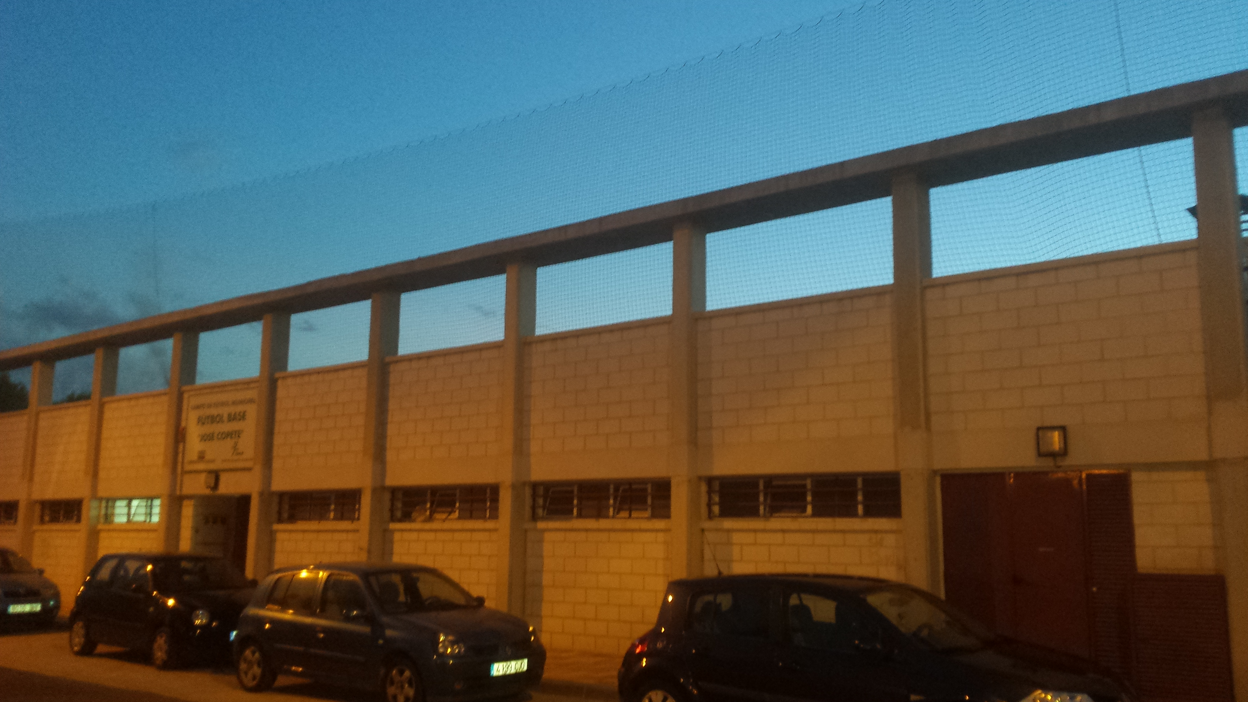 Campo de Fútbol José Copete. Barrio Universidad. Albacete